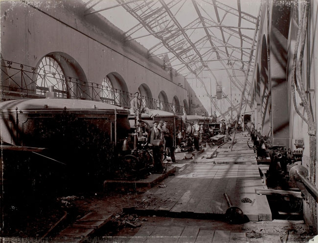 Emile Pricam (1844-1919), Usine hydroélectrique de Chèvres, incendie, 8 septembre 1898, épreuve photographique sur papier au collodion collée en plein sur carton fort, 20 x 26 cm, inv. Album SIG no 4, Chèvres 1897 et Usine à gaz